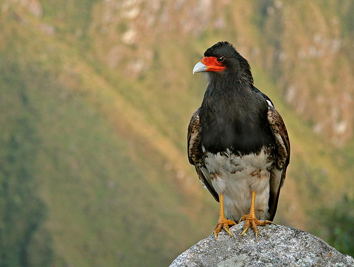 Mountain Caracara (Phalcoboenus megalopterus)